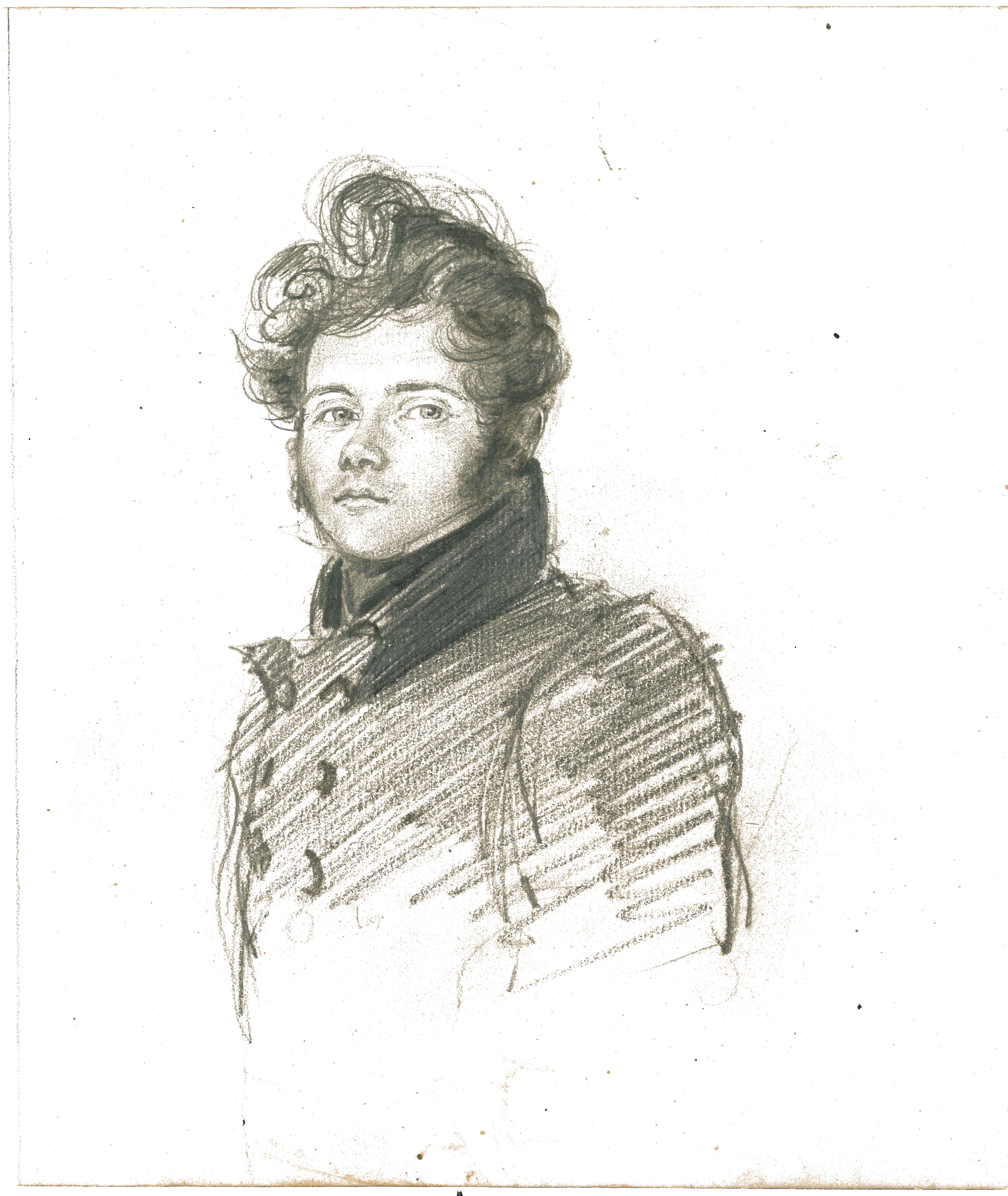 Portrait du baron Charles-Frédéric Chassériau par lui-même en 1825